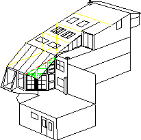 Skizze eines modernen Hauses mit solarer Fußbodenheizung (Hypotauscher)